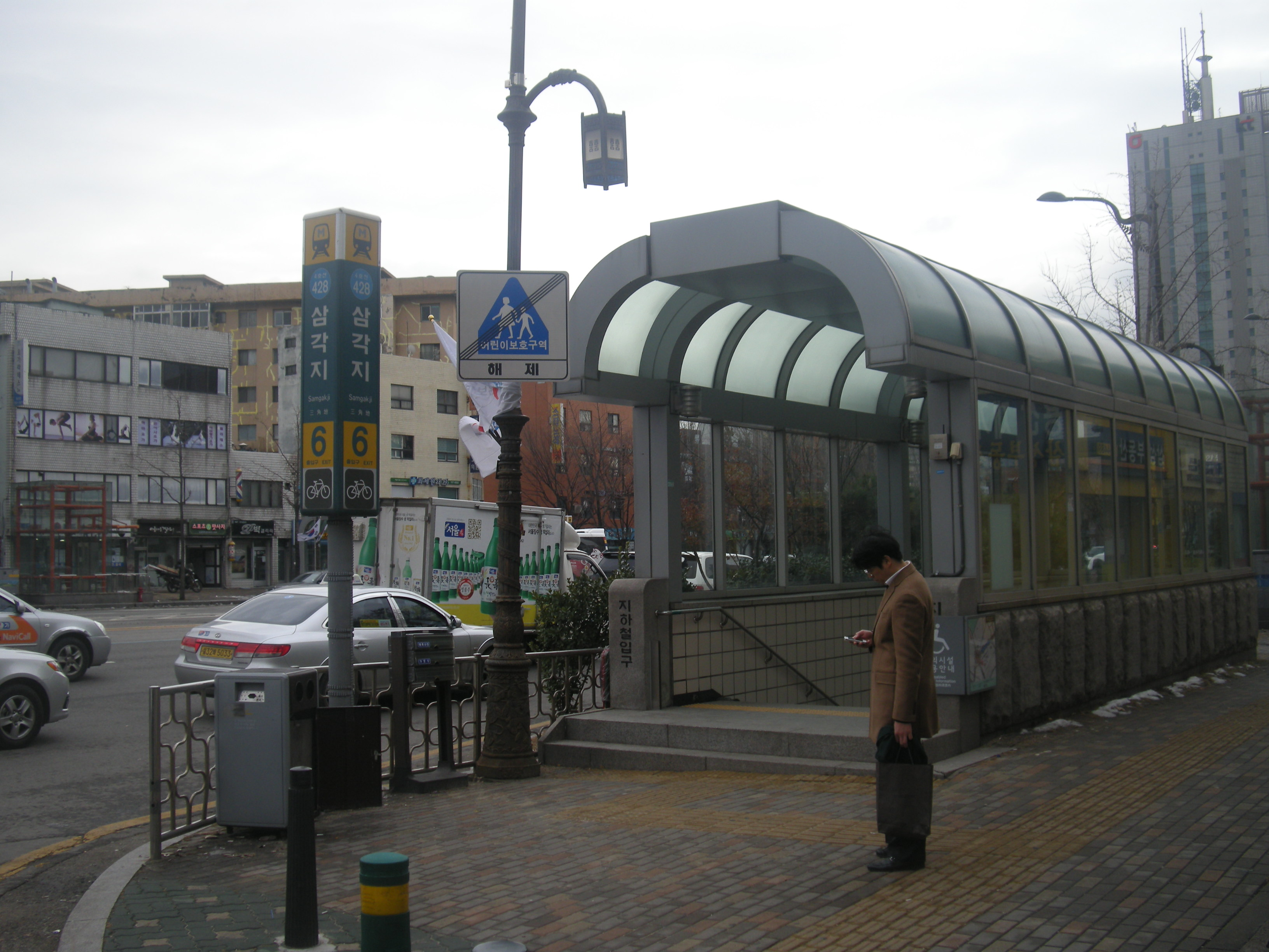 서울 지하철 4호선 삼각지역 6번 출구